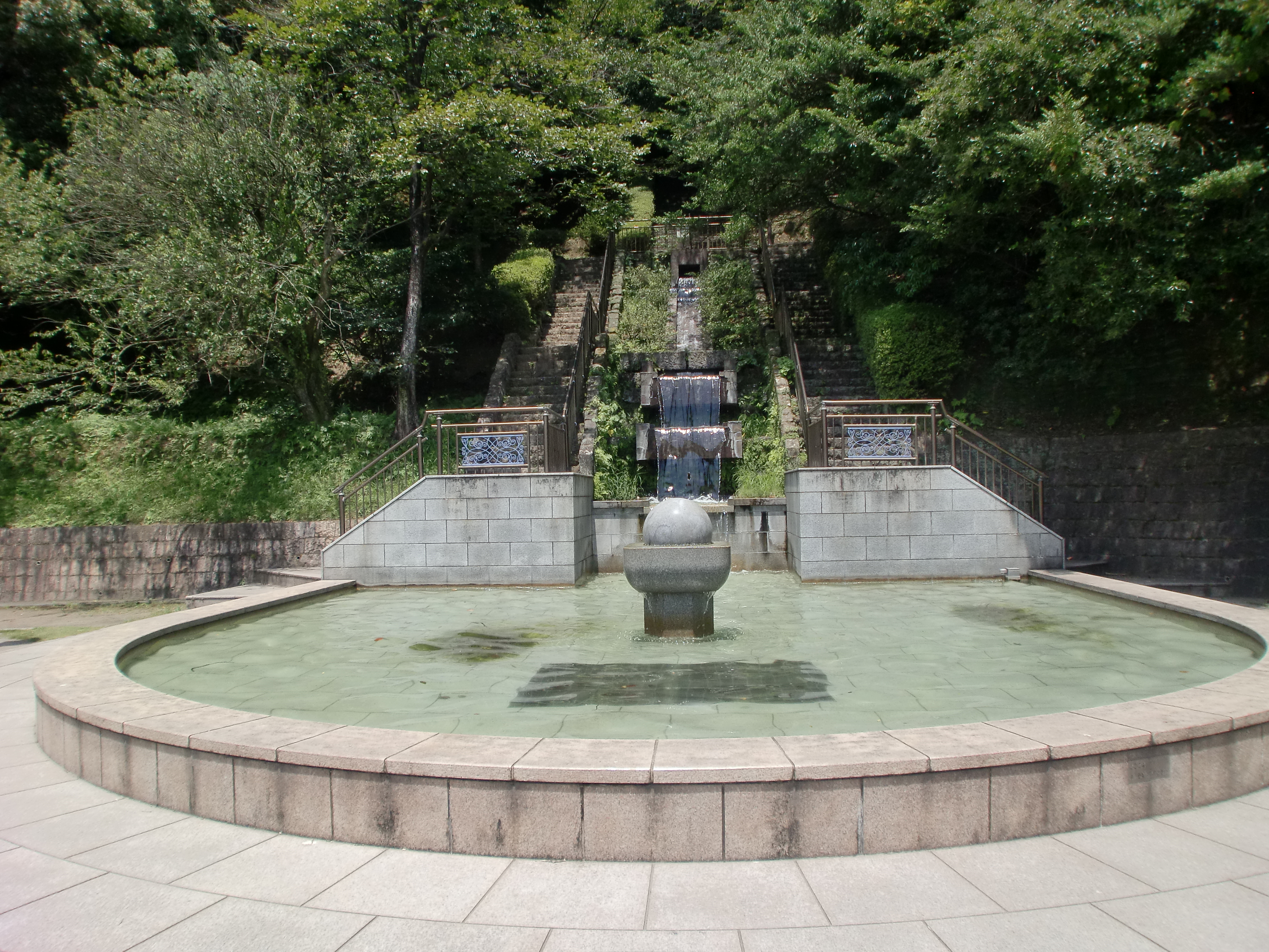 鹿児島県鹿児島市下福元町にある慈眼寺公園の噴水。